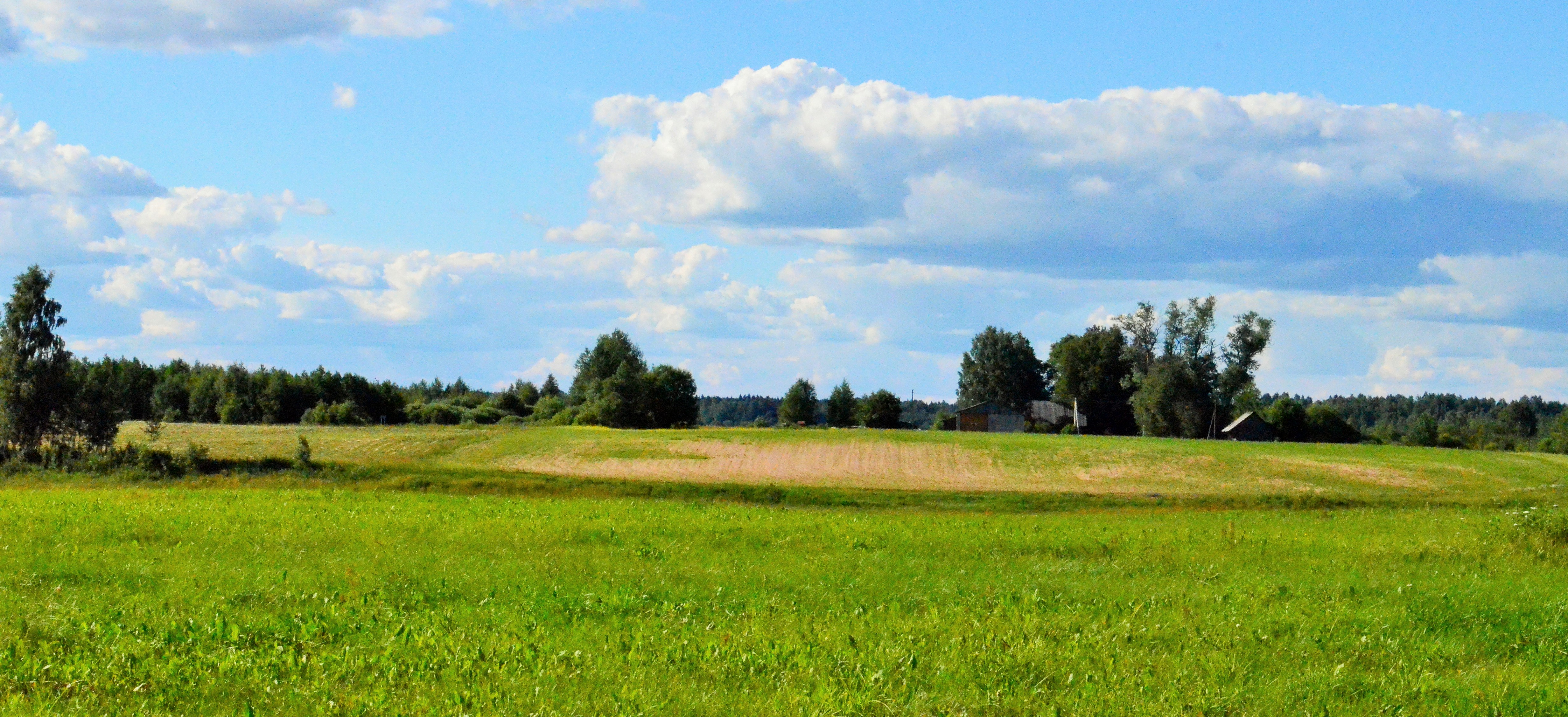 Rudžionys, Širvintų raj.